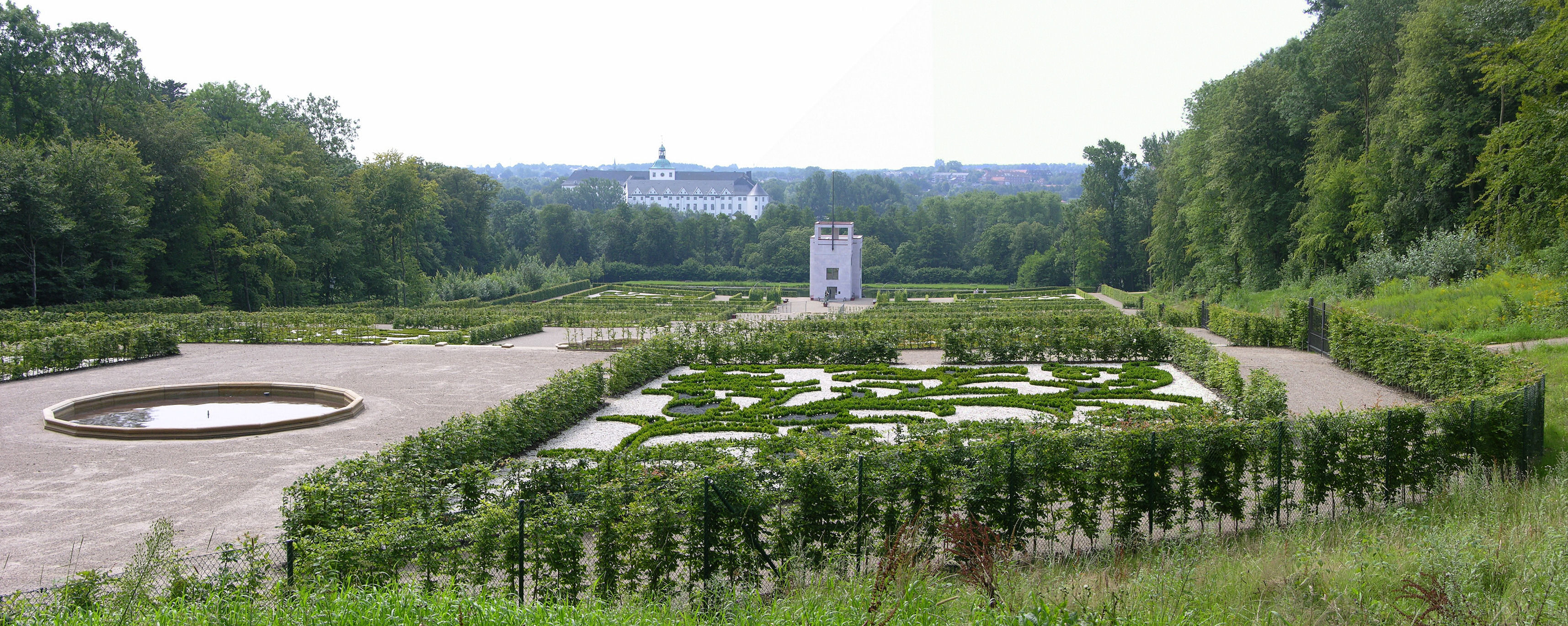 Neuwerkgarten looking south